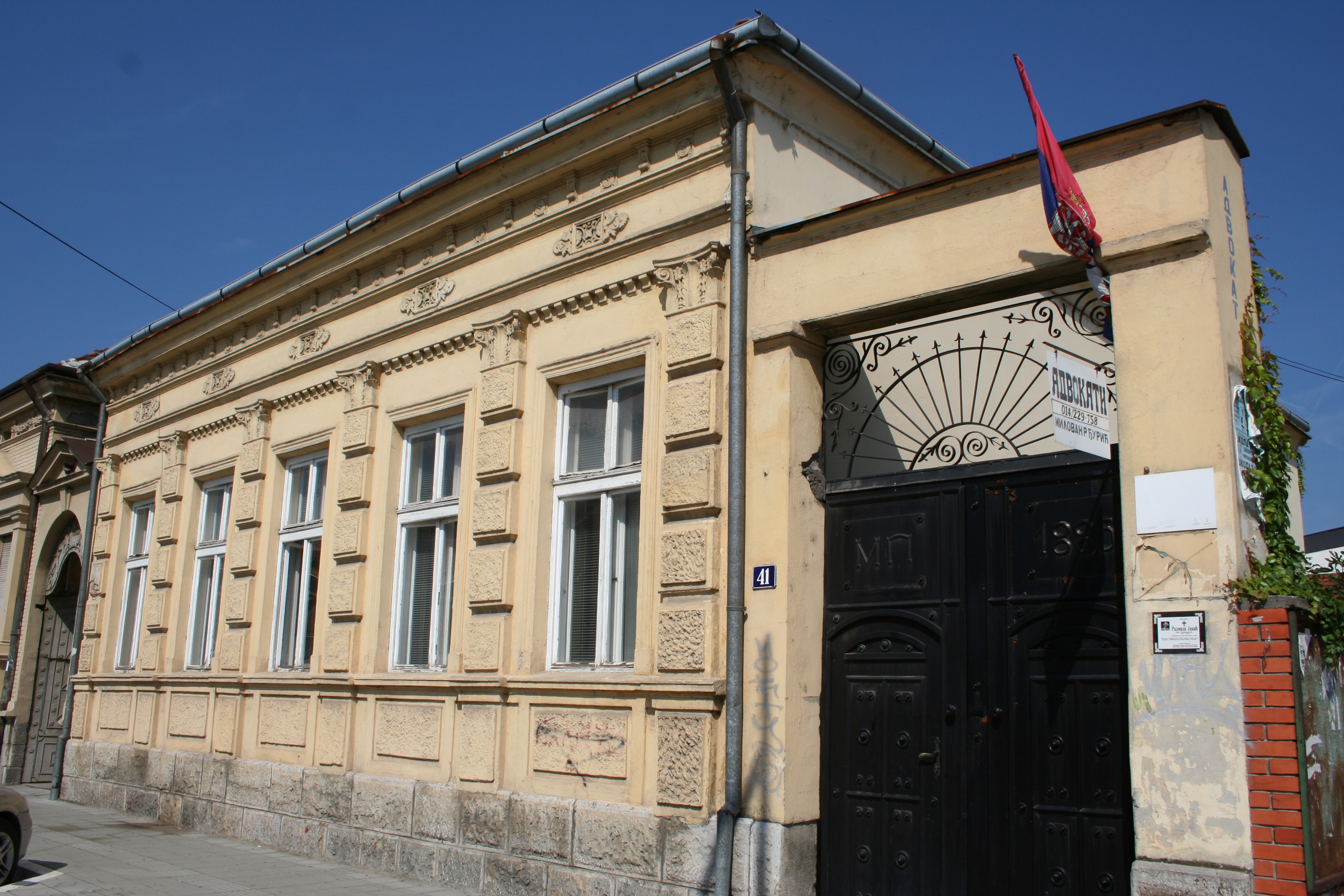 Kuća, Karađorđeva 39, Valjevo